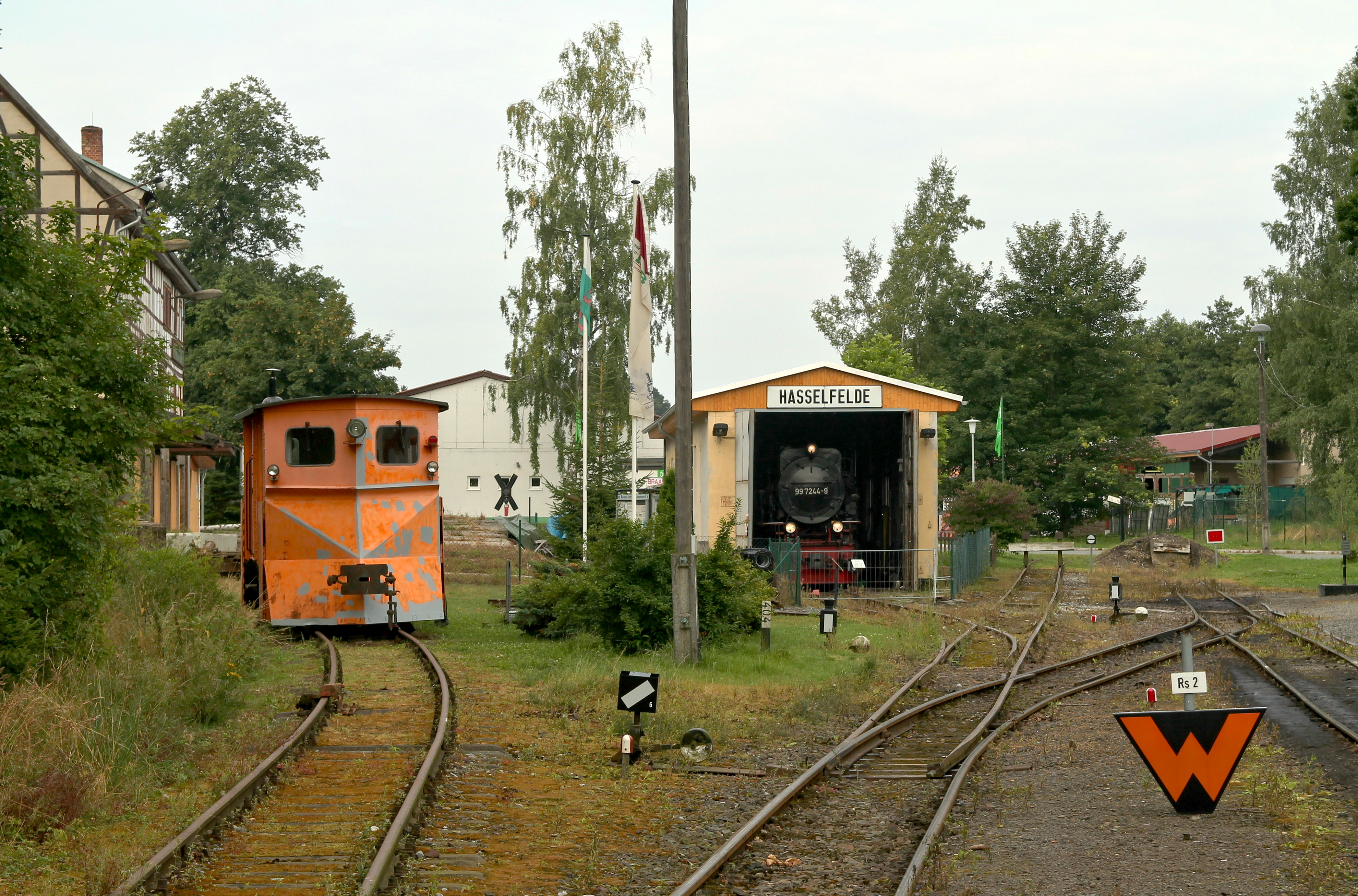 Hasselfelde Bahnhof der HSB mit Lokschuppen am 17.August 2012